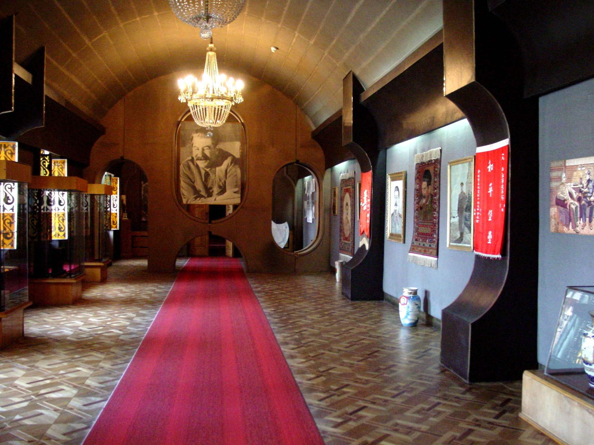 No comment.